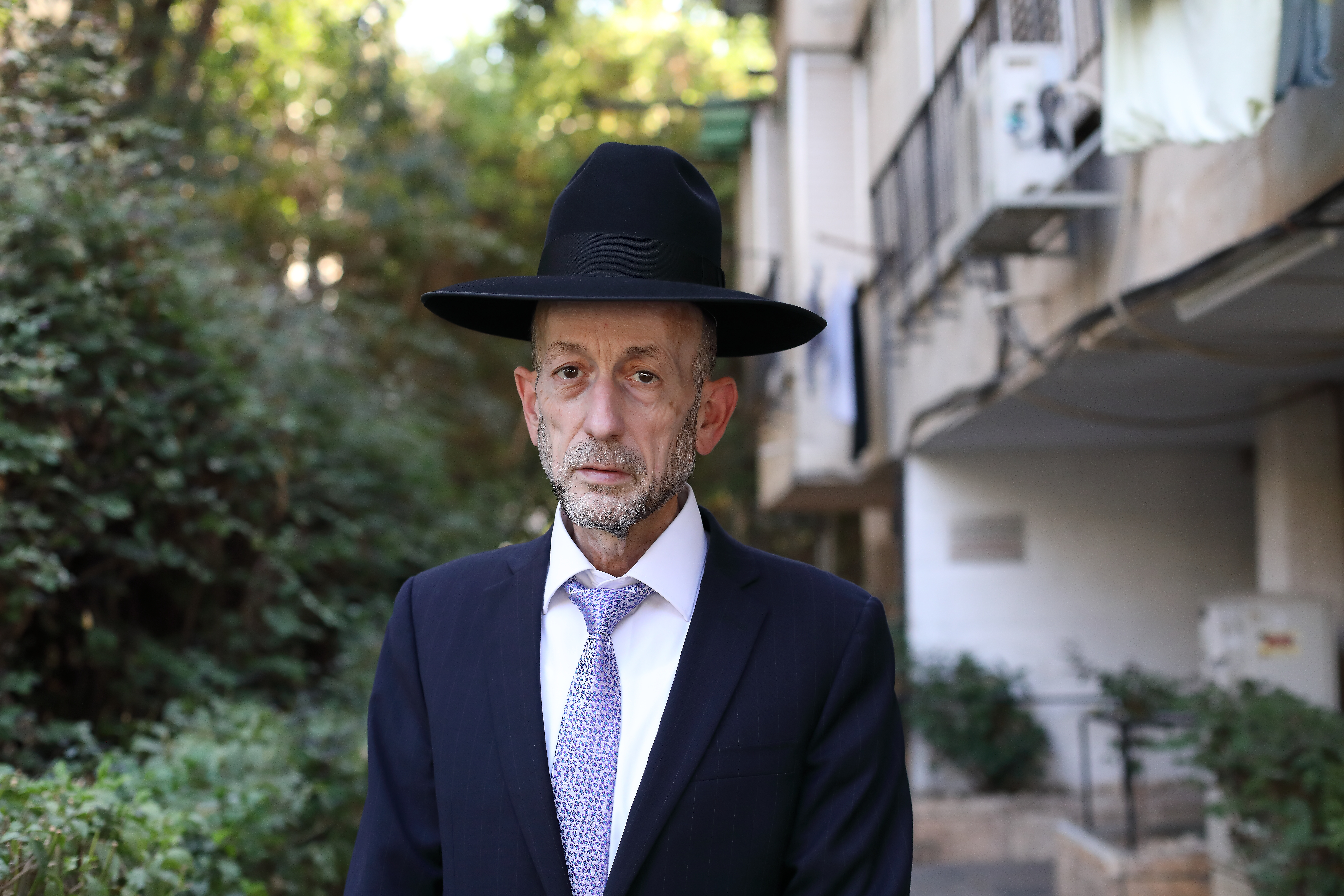 חבר הכנסת אורי מקלב